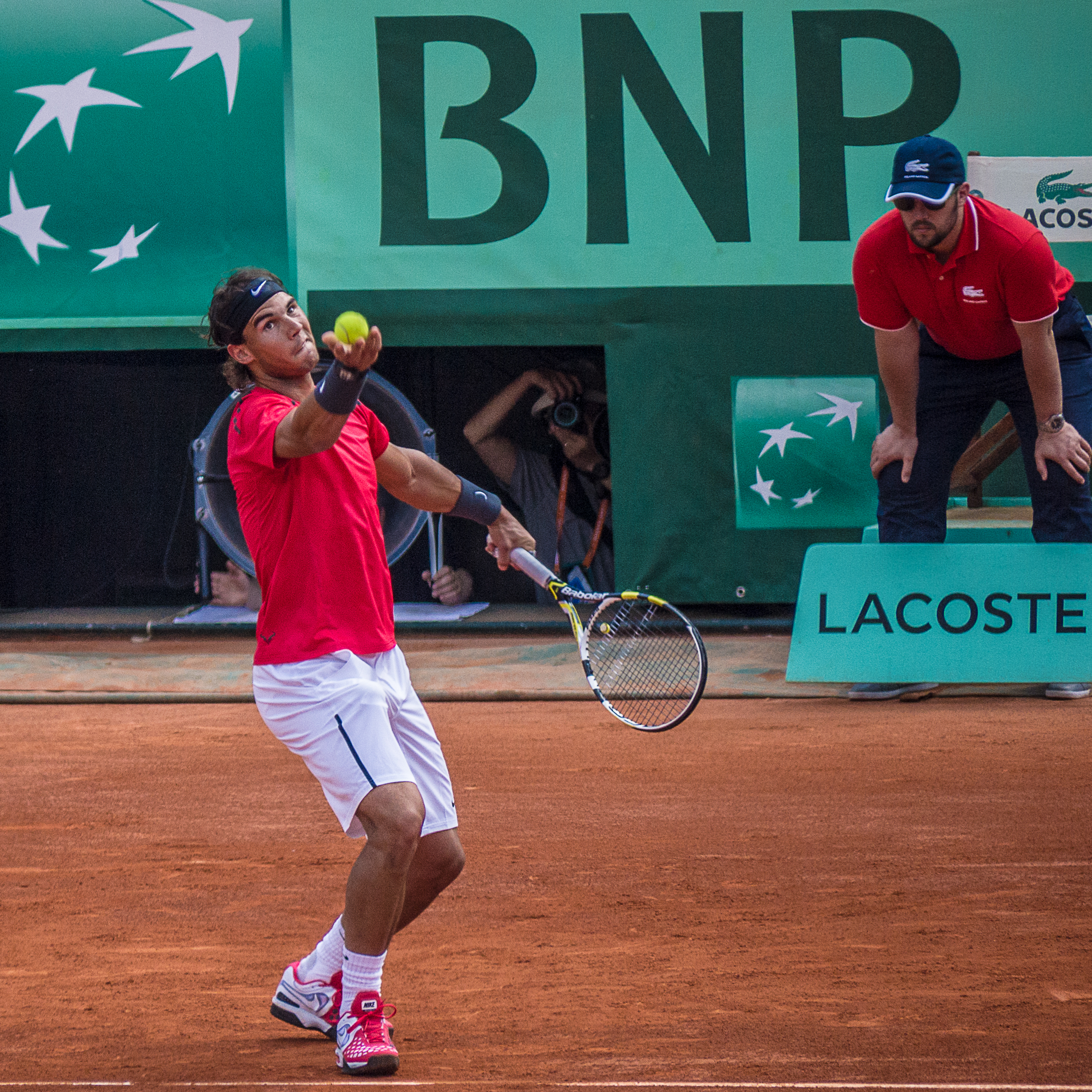 1er tour Roland Garros 2012 : Rafael Nadal (ESP) def. Simone Bolelli (ITA)